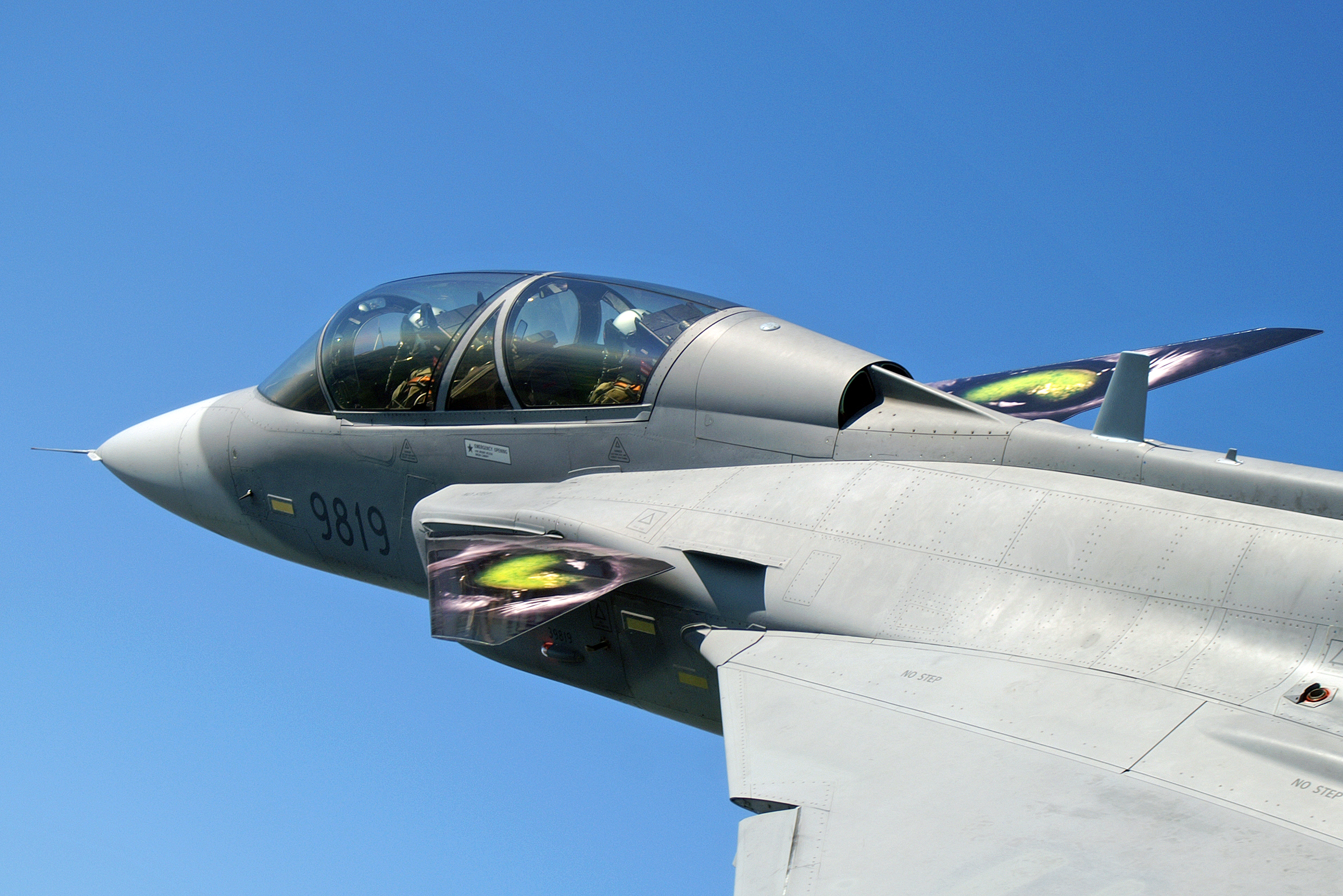 steep climb